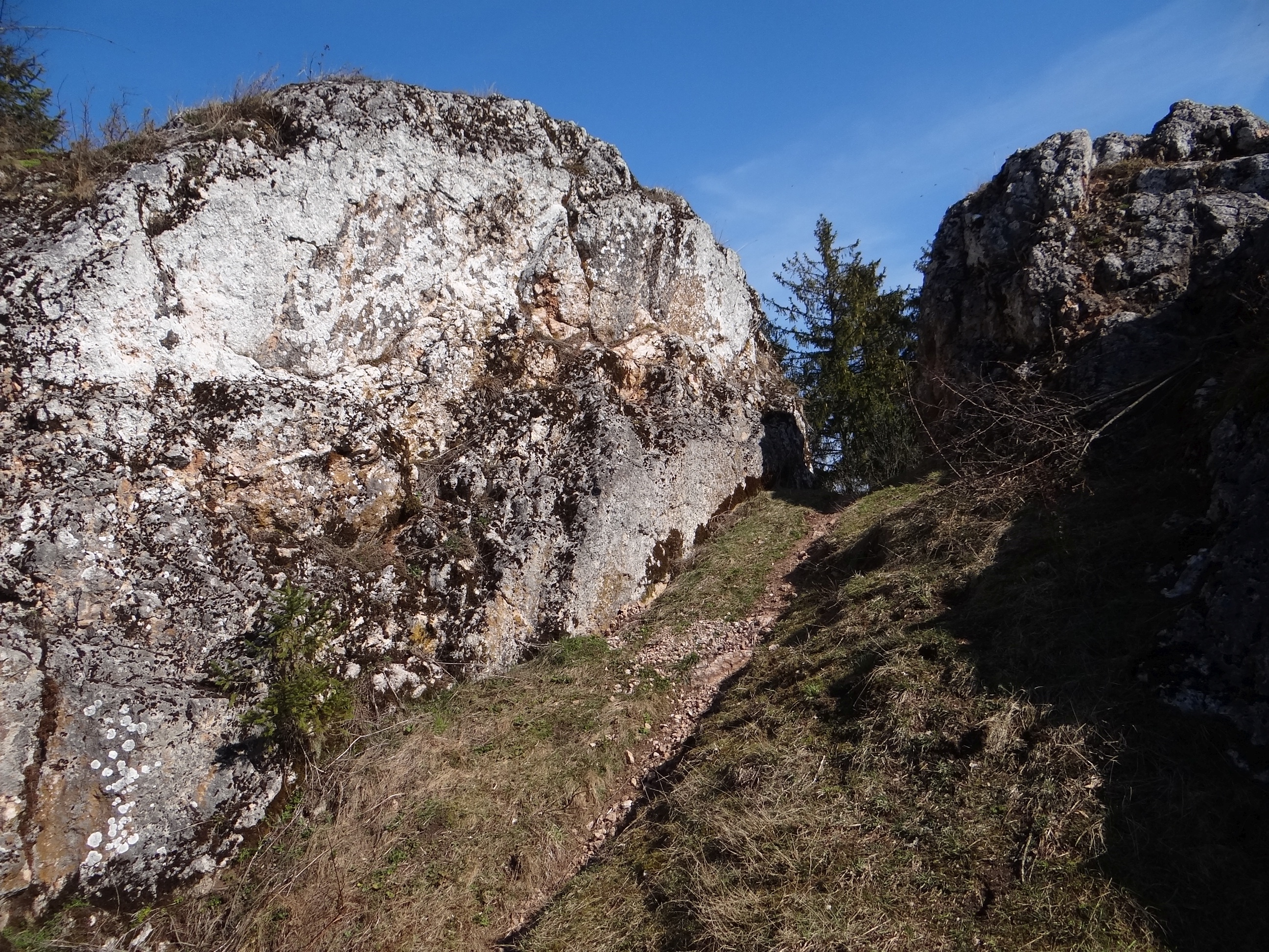 Rezerwat przyrody Rogoźnicka Skałka